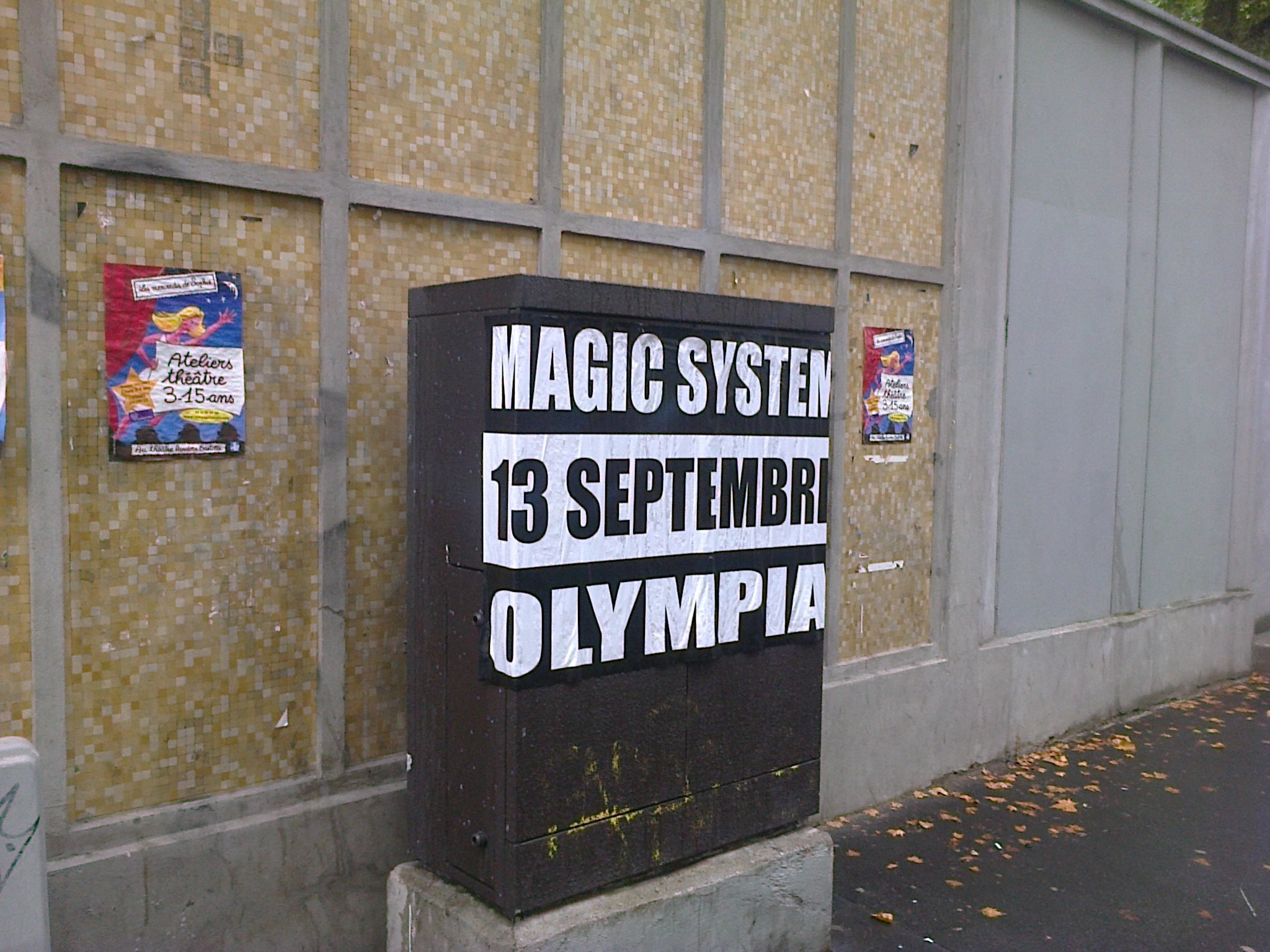 Affiche du Concert de Magic System du 13 septembre 2014 à l'Olympia rue Keller à Paris